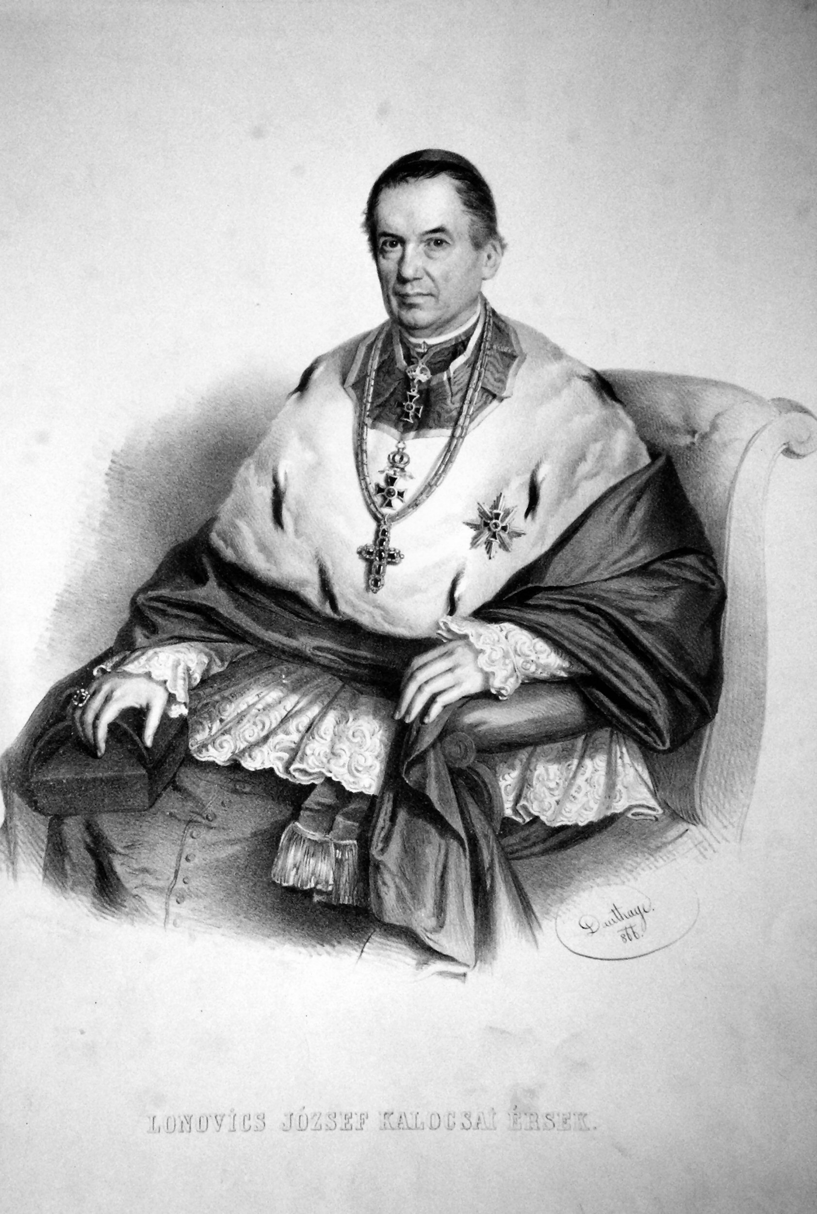 Josef Lonovics von Krivina (1793-1867), Theologe, ungarischer Freiheitskämpfer, Erzbischof von Kalocsa. Lithographie von Adolf Dauthage, 1866.